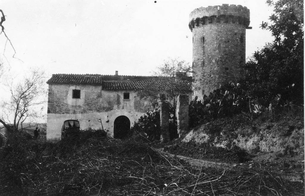 Façana de Can Minguet amb torre circular. Jordi Audet i Viñals (1926-12)